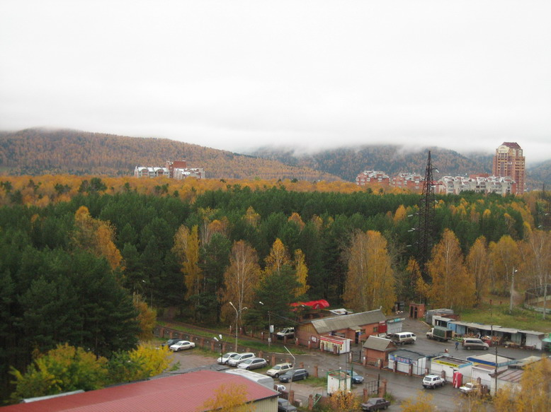 Upper Akademgorodok near Krasnoyarsk